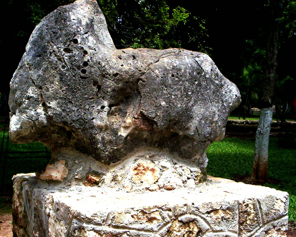 Tapir de piedra en el zoológico de Tizimín, Yucatan, Mexico.